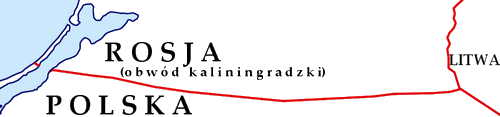 Granica polsko-rosyjska